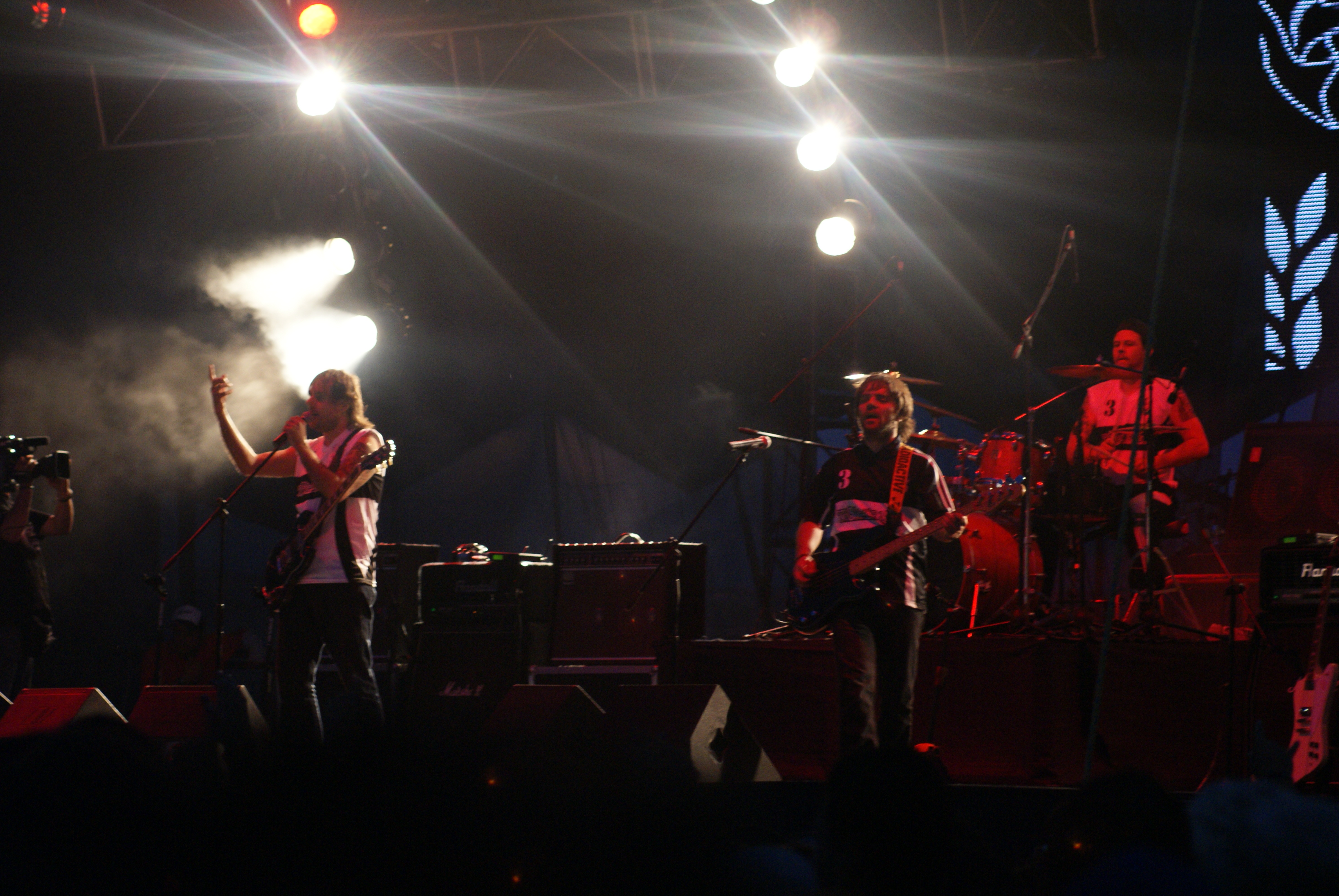 Tr3s de Corazón. Altavoz 2009